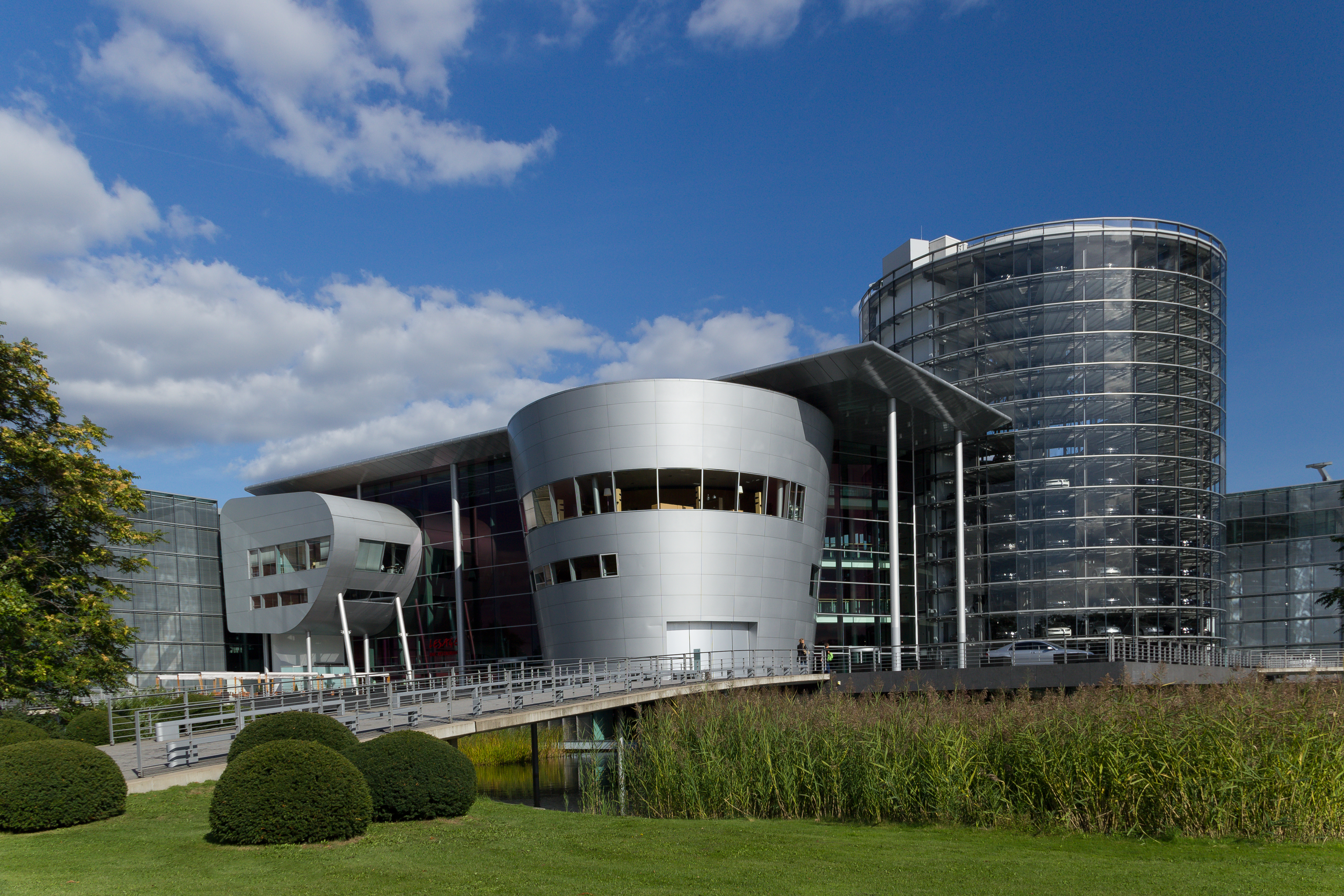 Die Gläserne Manufaktur von VW in Dresden.